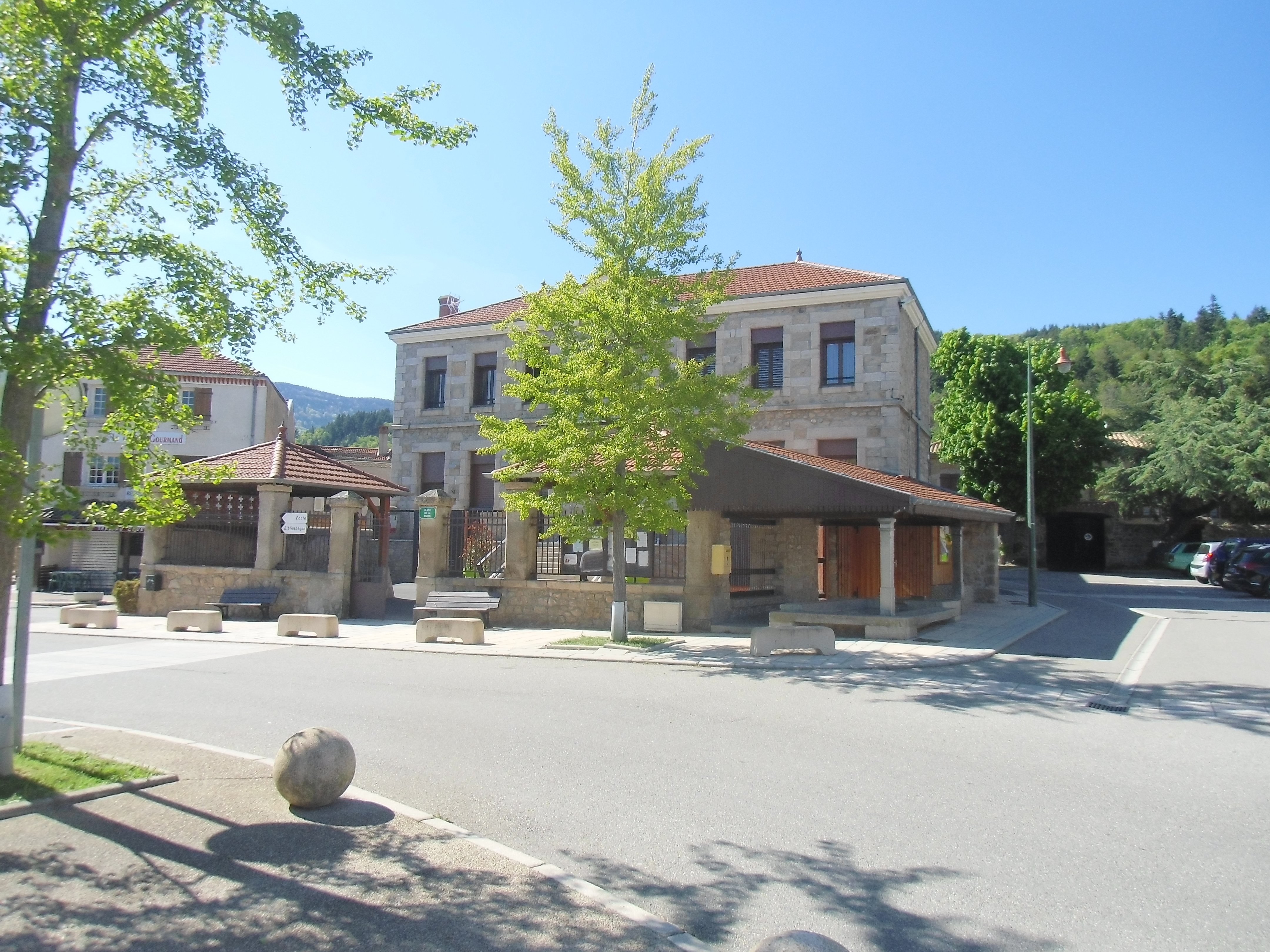 La place de Véranne (Loire) en 2014.